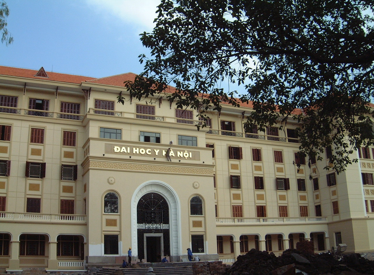 La faculté de Médecine de Hanoï